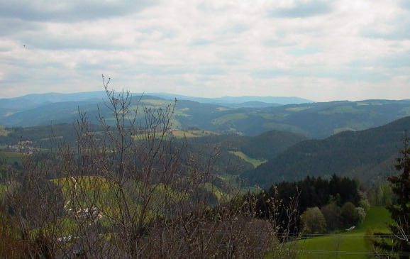 Joglland bei Fischbach